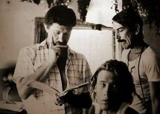 Александр Сокуров (режиссёр), Алексей Ананишнов (исполнитель главной роли) и Сергей Юриздицкий (оператор): пауза во время съёмок кинофильма «Дни Затмения», Сокуров читает сценарий и решает, что делать дальше, Юриздицкий ждёт решения, Ананишнов просто так сидит (голова на переднем плане)